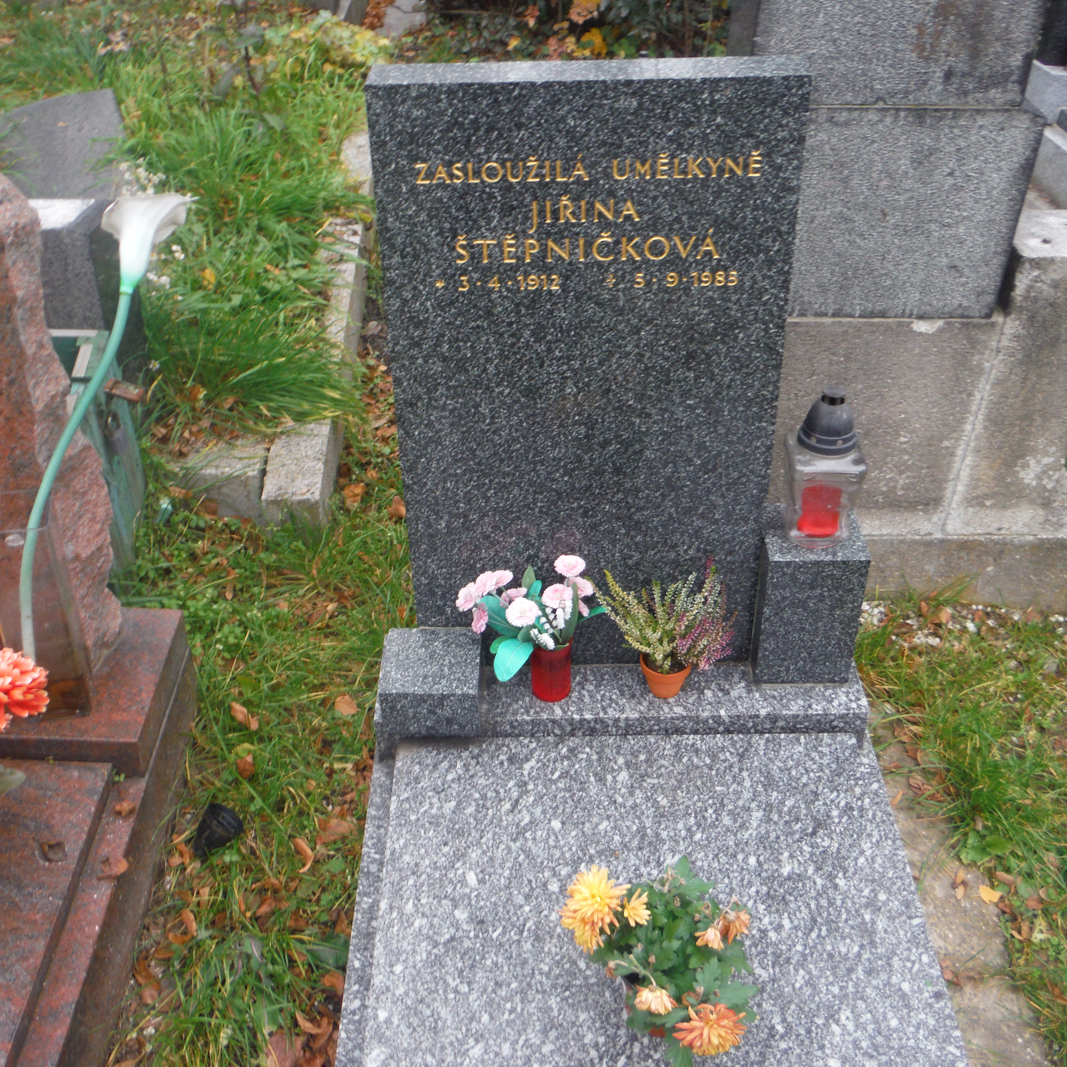 Hrob Jiřiny Štěpničkové, české herečky